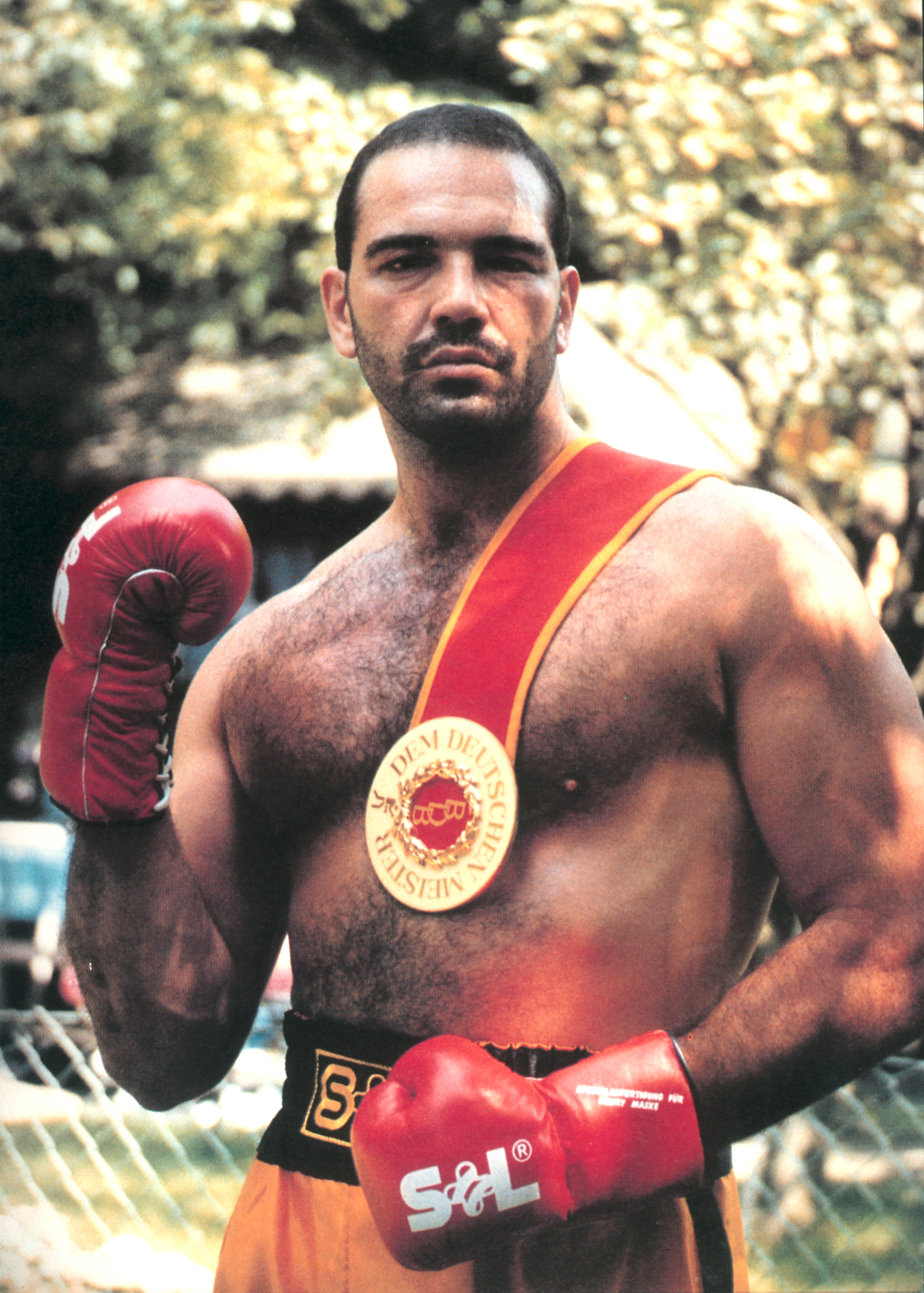 IDM 1992